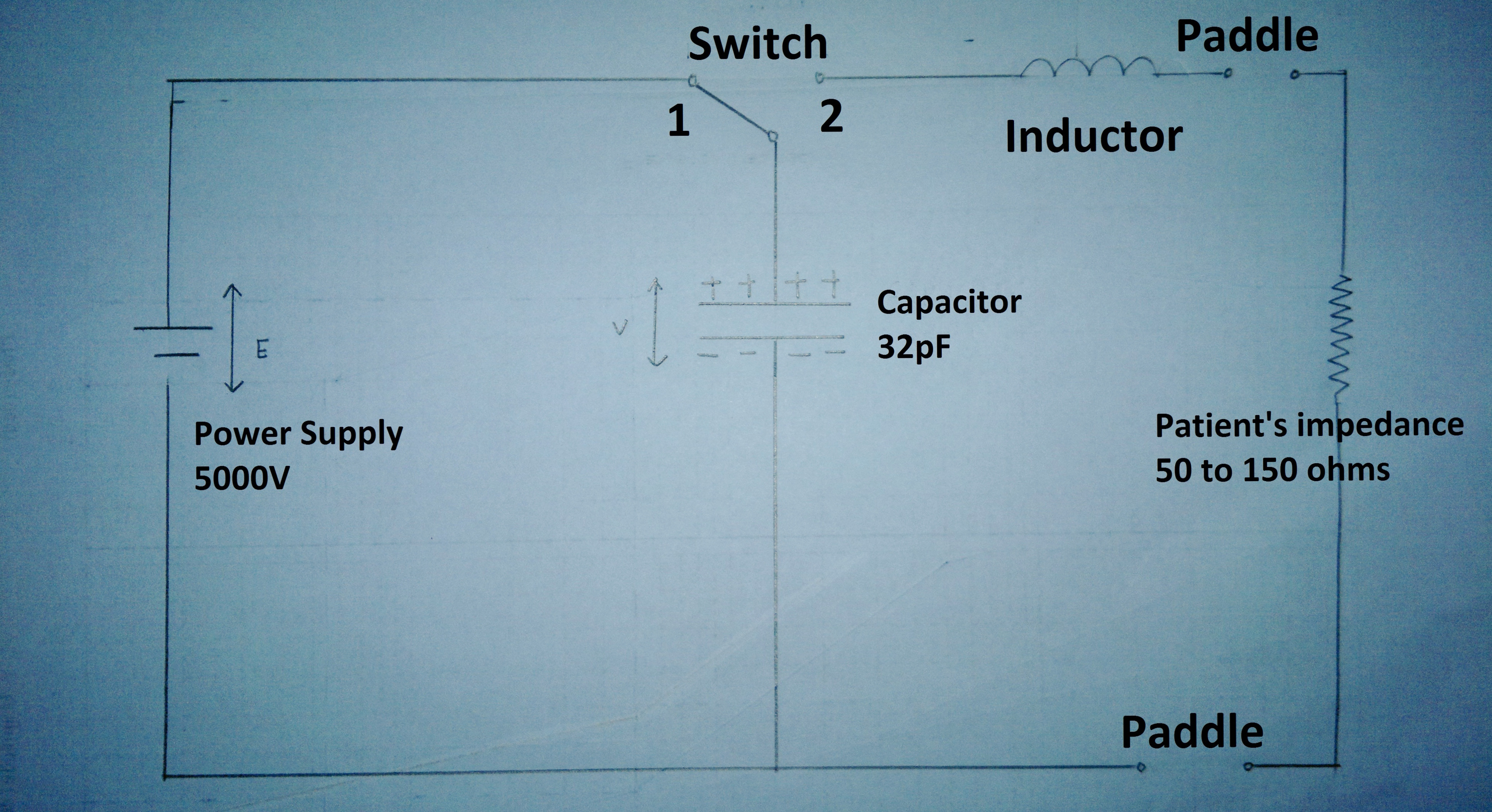 Mekanisme Defibrilator